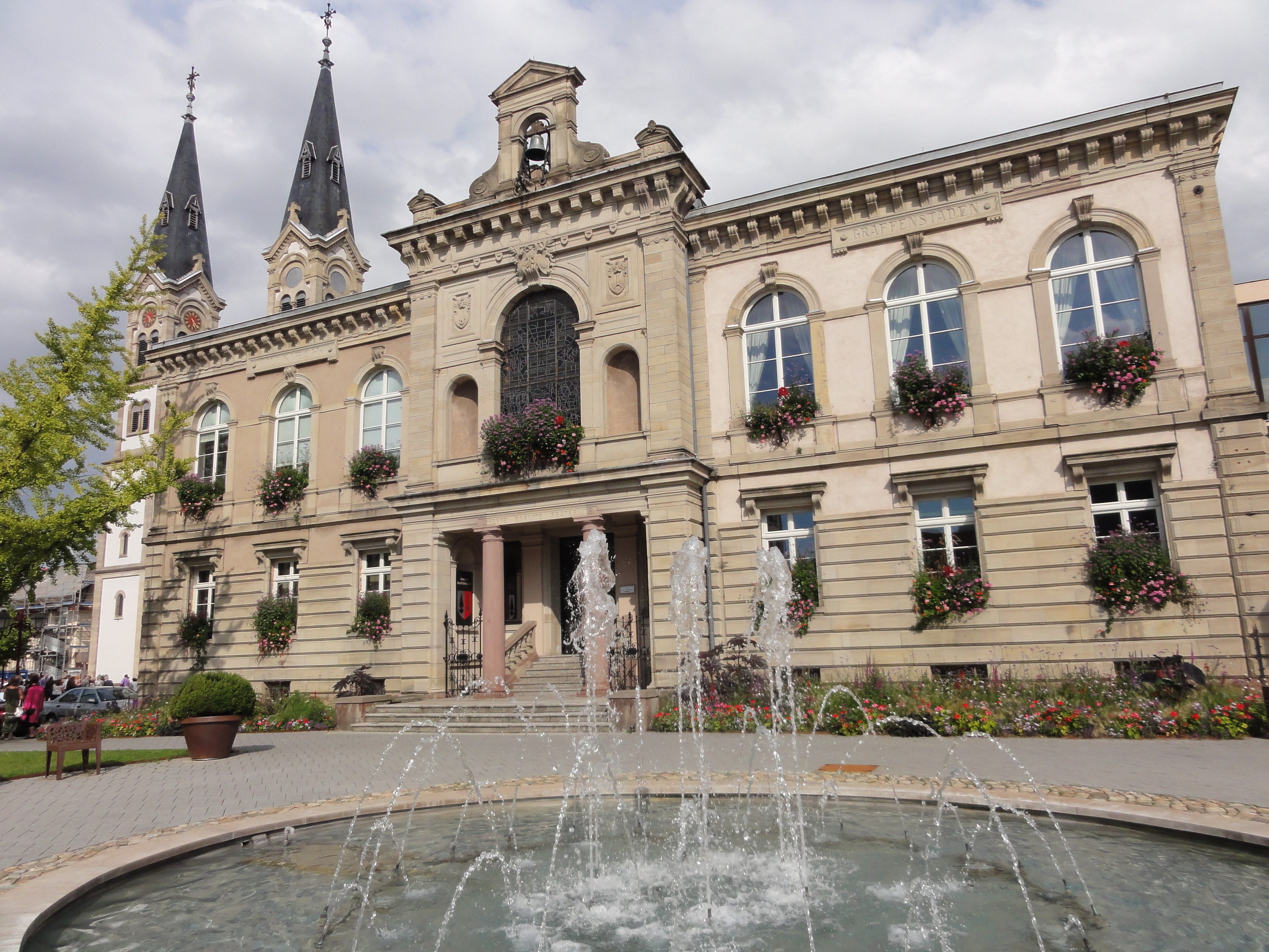 Alsace, Bas-Rhin, Illkirch-Graffenstaden, Hôtel de ville.